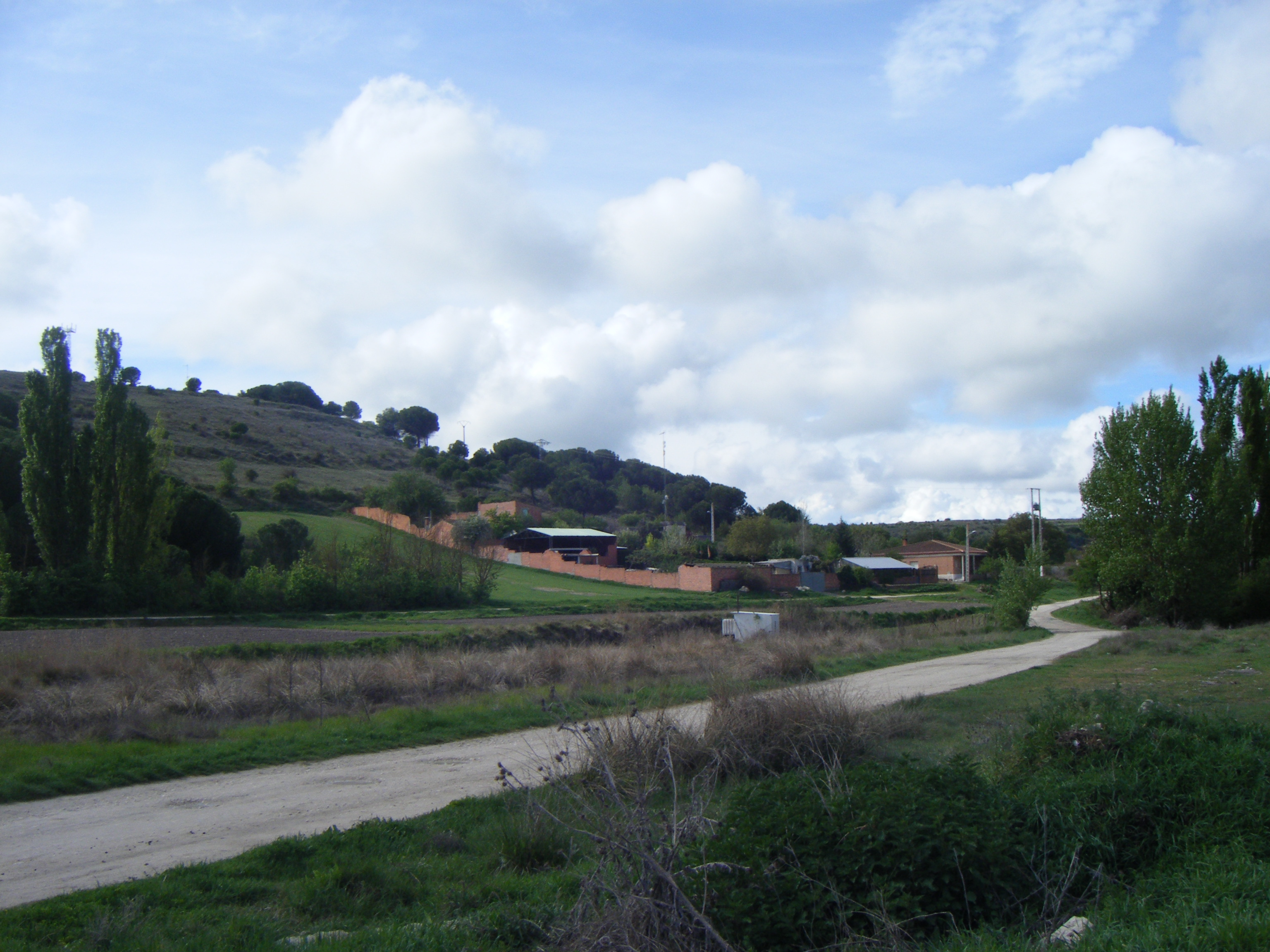 Bidea.